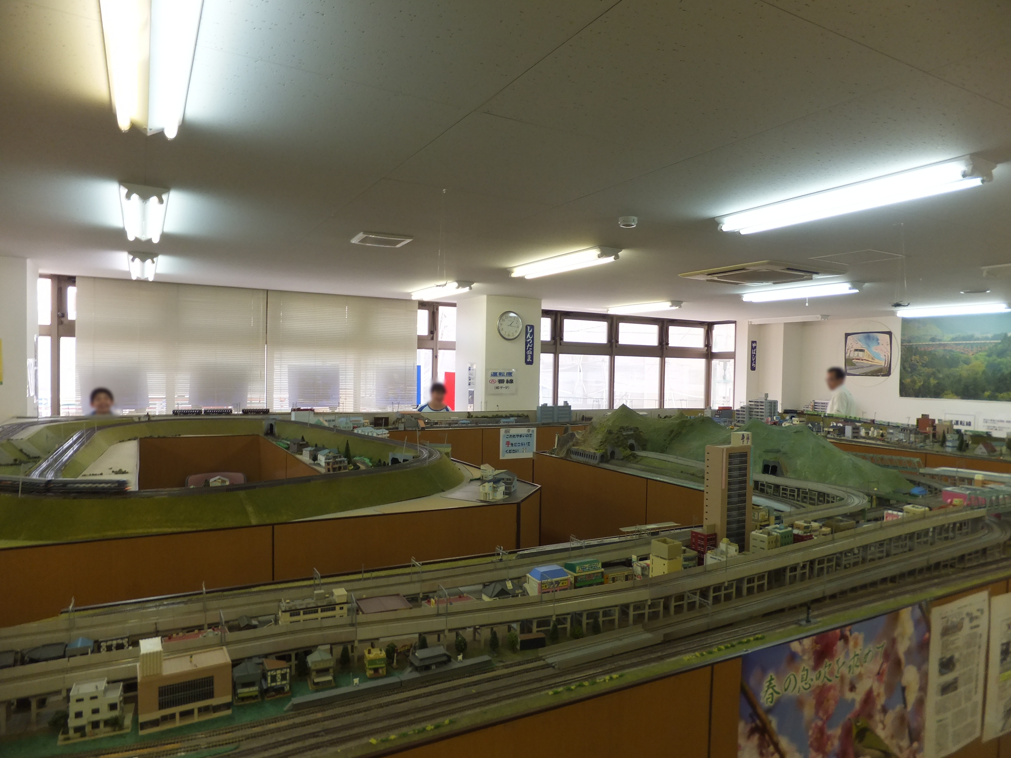 新京成電鉄・上本郷駅駅ビルの一室にあった新京成鉄道模型館。この撮影日のすぐ後の2012年4月8日に閉館した。